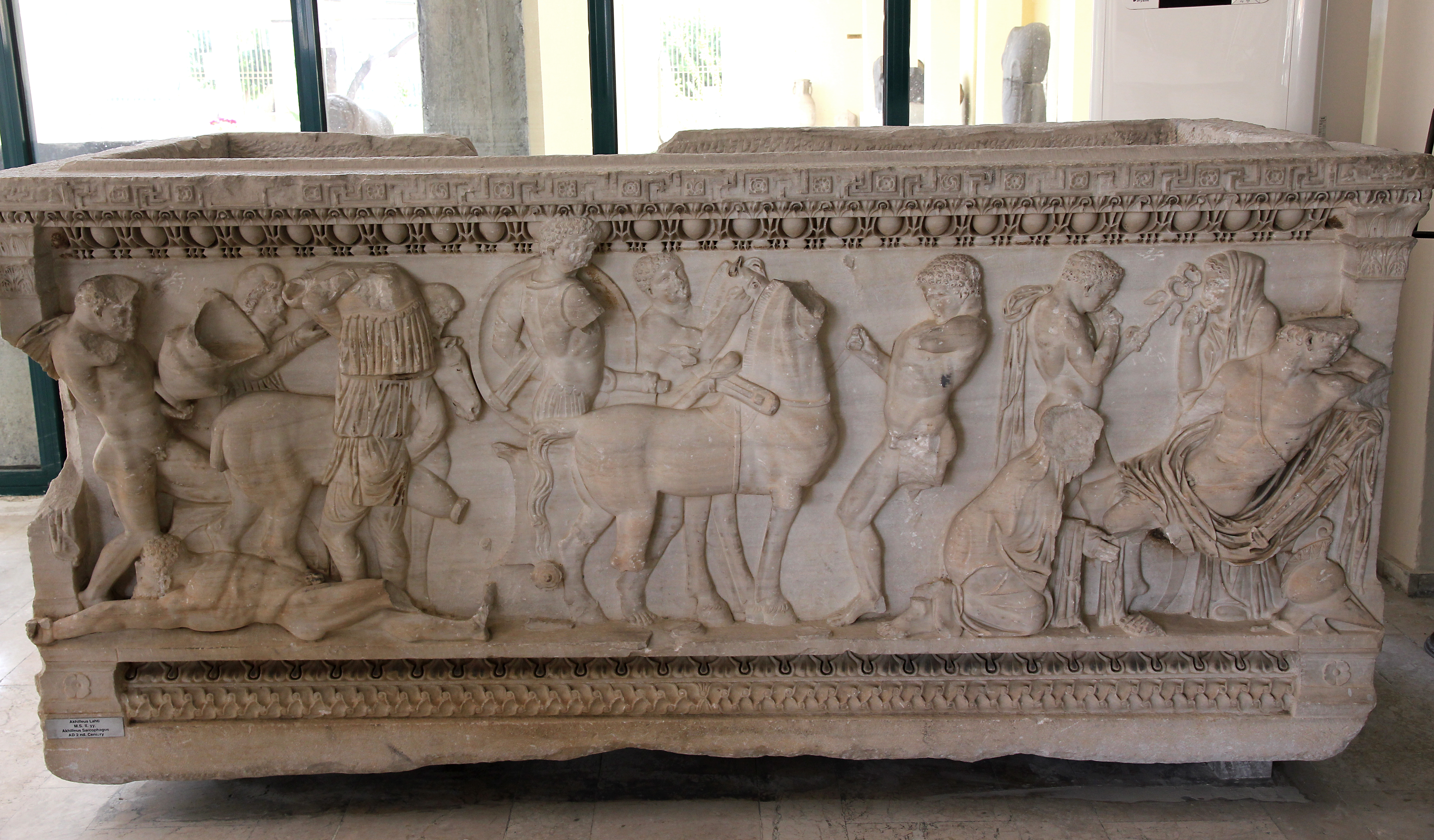 Archäologisches Museum Adana, Südtürkei, so genannter Achilles-Sarkophag mit Szenen aus dem Trojanischen Krieg